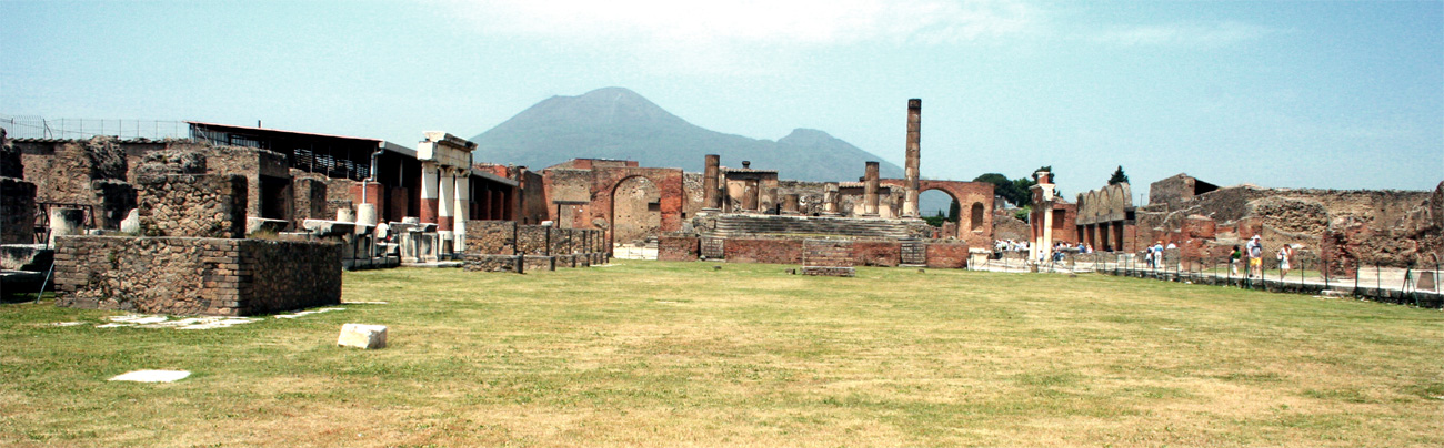 Foro (Pompeya)